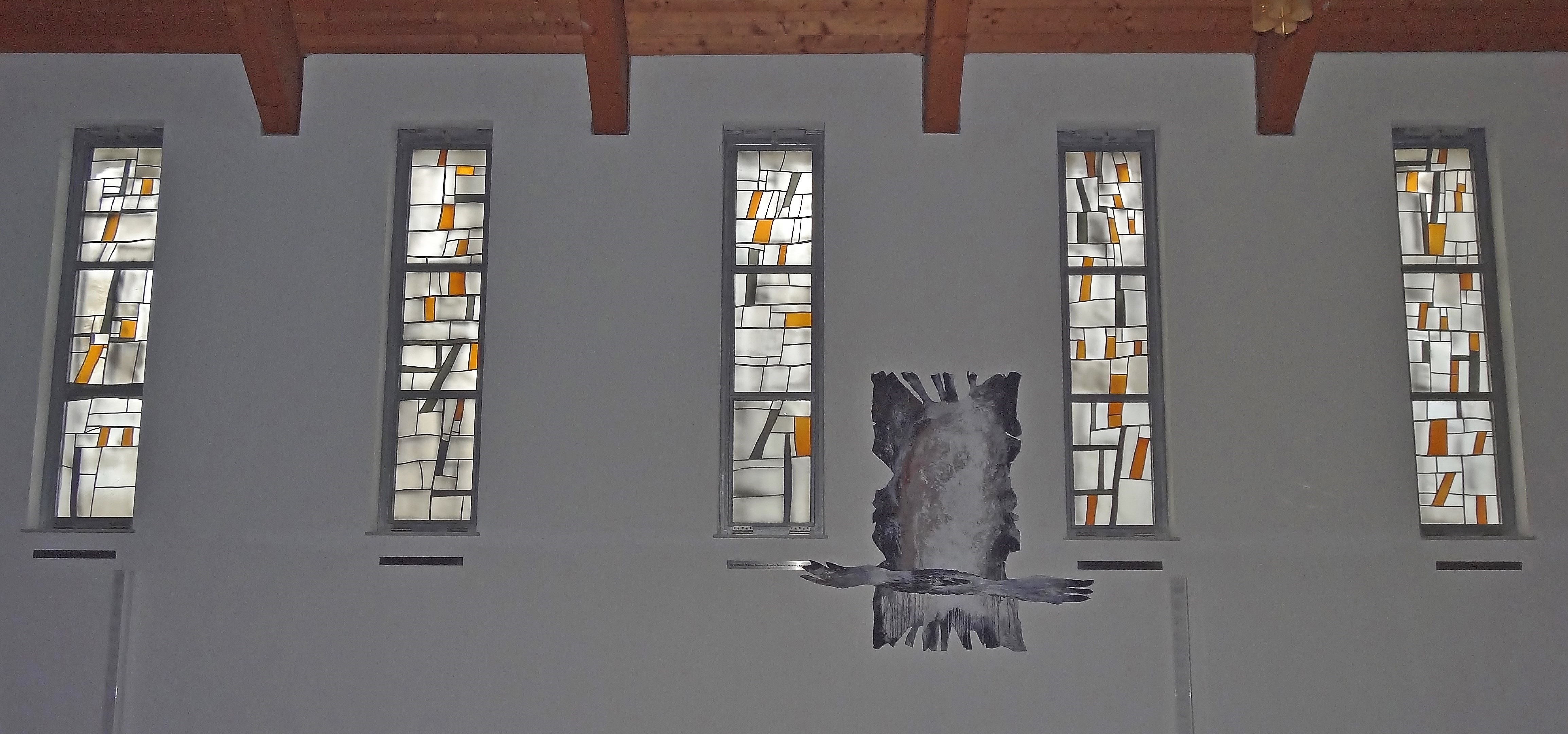 Stadtpfarrkirche Maria im Dorn (Feldkirchen in Kärnten), Glasfenster von Giselbert Hoke (2009)